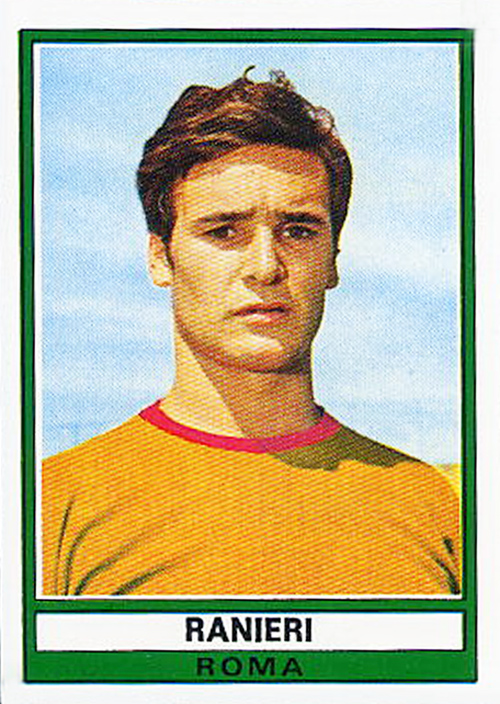 Claudio Ranieri che indossa la maglia del Roma